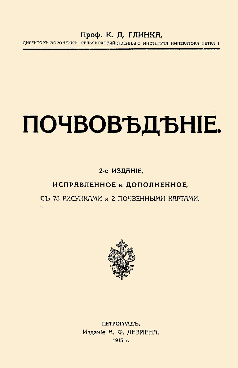 Обложка последнего дореволюционного издания учебника «Почвоведение» К. Д. Глинки